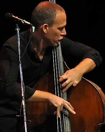 Avishai0047